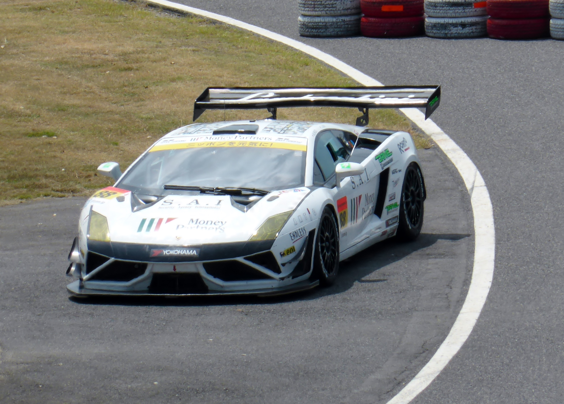 2013年度ポッカサッポロ1000㎞に於けるマネパランボルギーニGT3を撮影。後日みんカラにもアップロード予定。